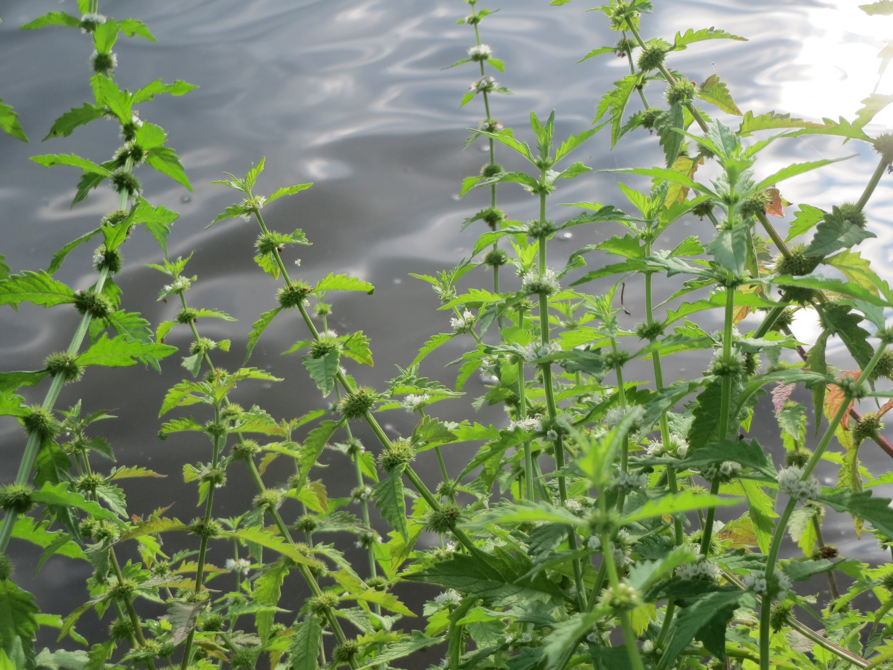 Ufer-Wolfstrapp (Lycopus europaeus) an der Saar in Saarbrücken